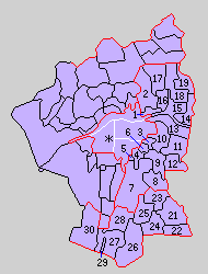 後の大阪府東成郡域の町村制時点の町村。